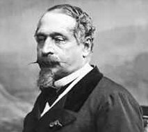 Foto van Napoleon III